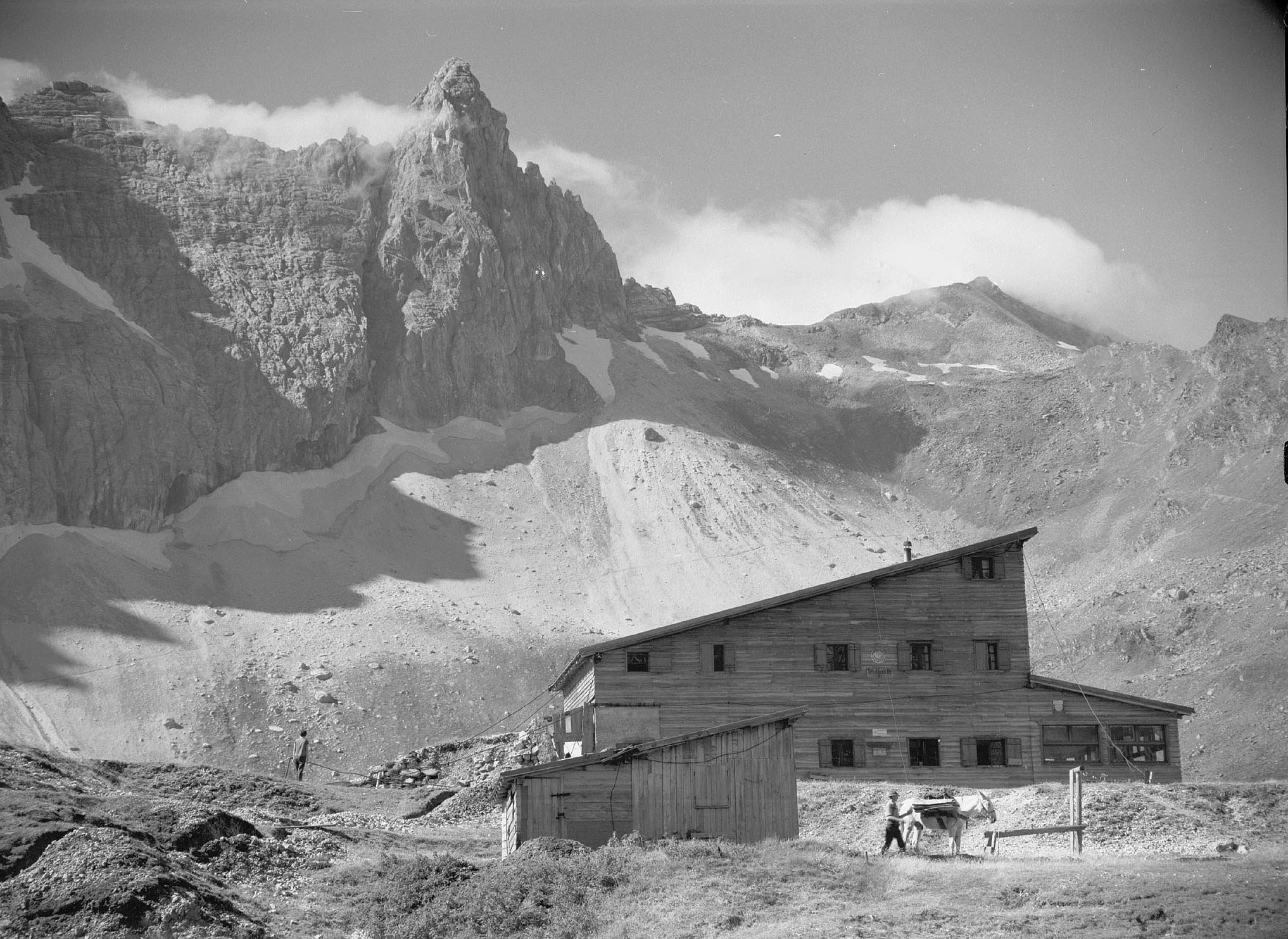 [Tribulaunhütte gegen Goldkappl und Pflerscher Pinggl / Tirol]